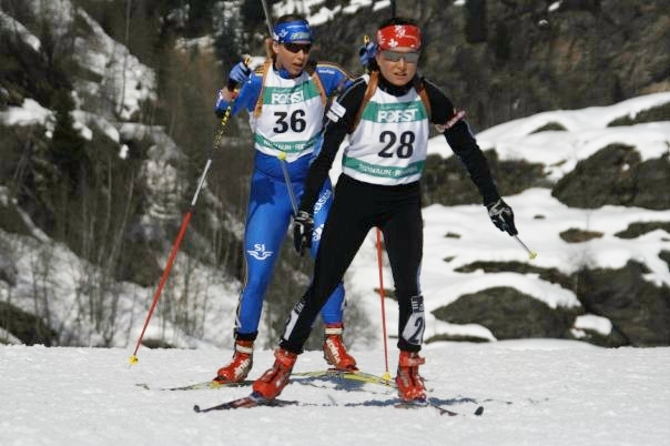 See Title